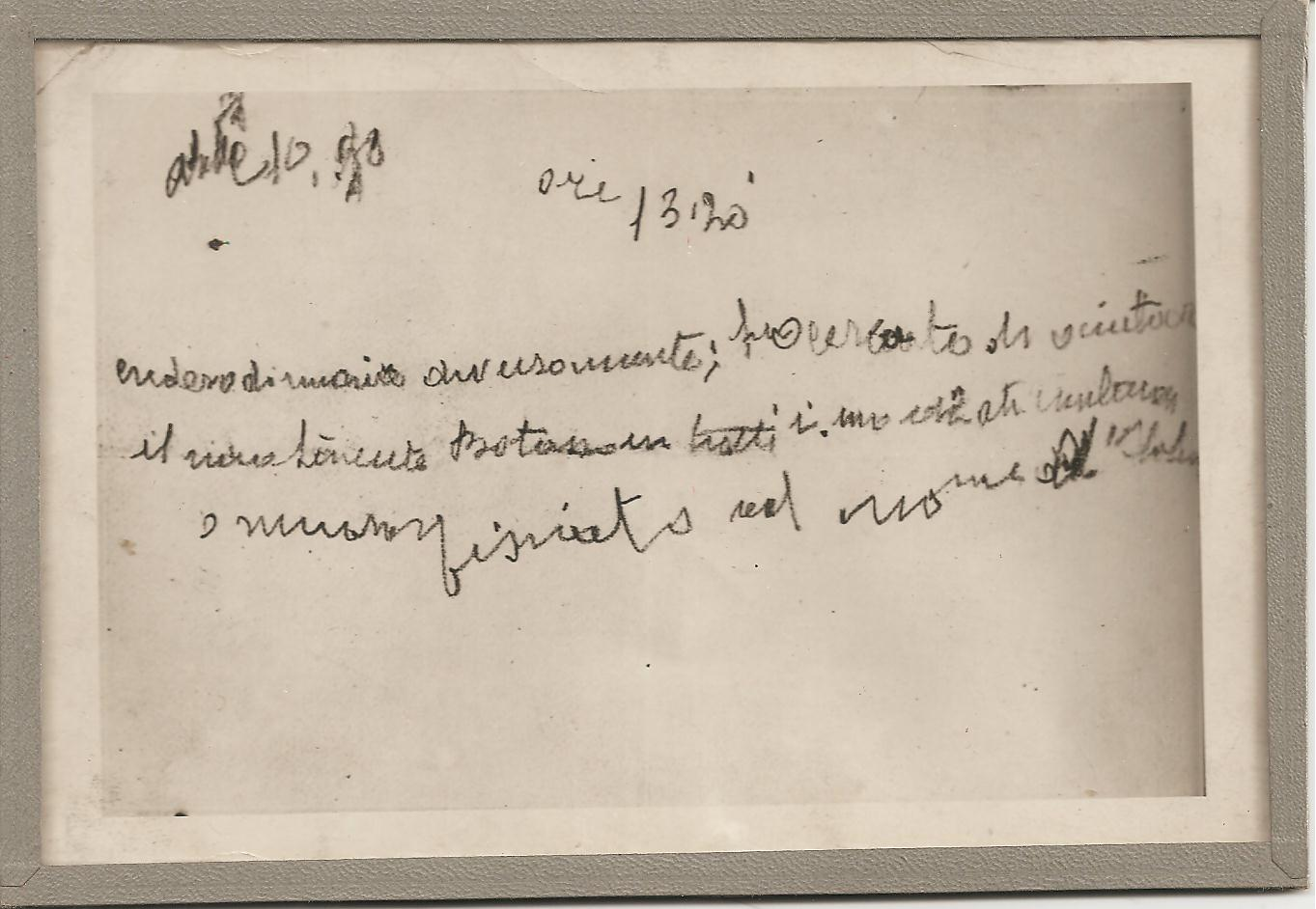 Copia del testamento autografo scritto in punto di morte dal Maggiore Vincenzo Arbarello: "Credevo di morire diversamente, ho aiutato in tutti i modi il tenente Botasso, inutilmente; muoio asfissiato in nome d'Italia